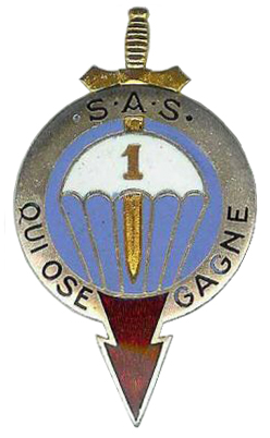 Insigne régimentaire du 1° RPIMa